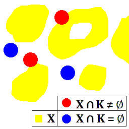 Illustration de la Capacité de Choquet